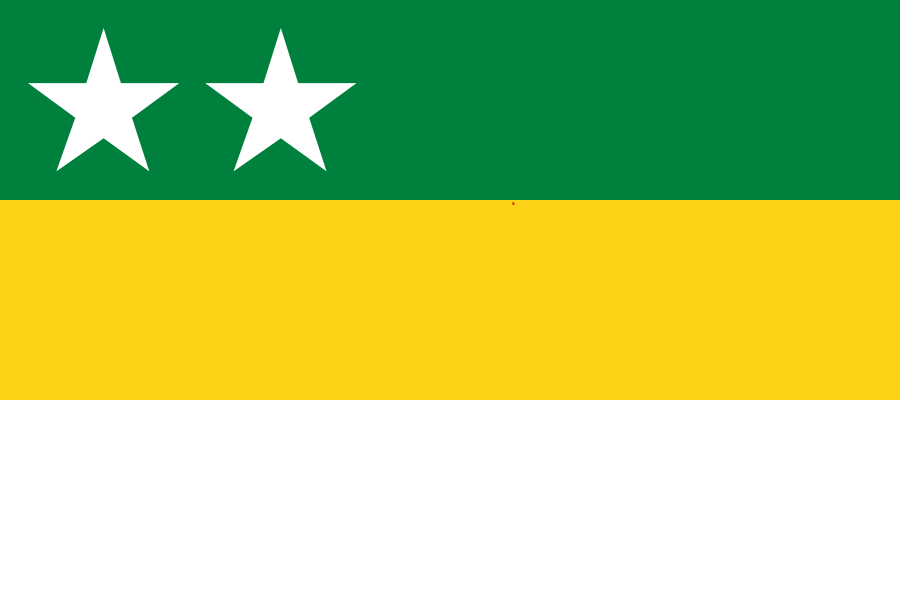 Bandera del Cantón Pichincha